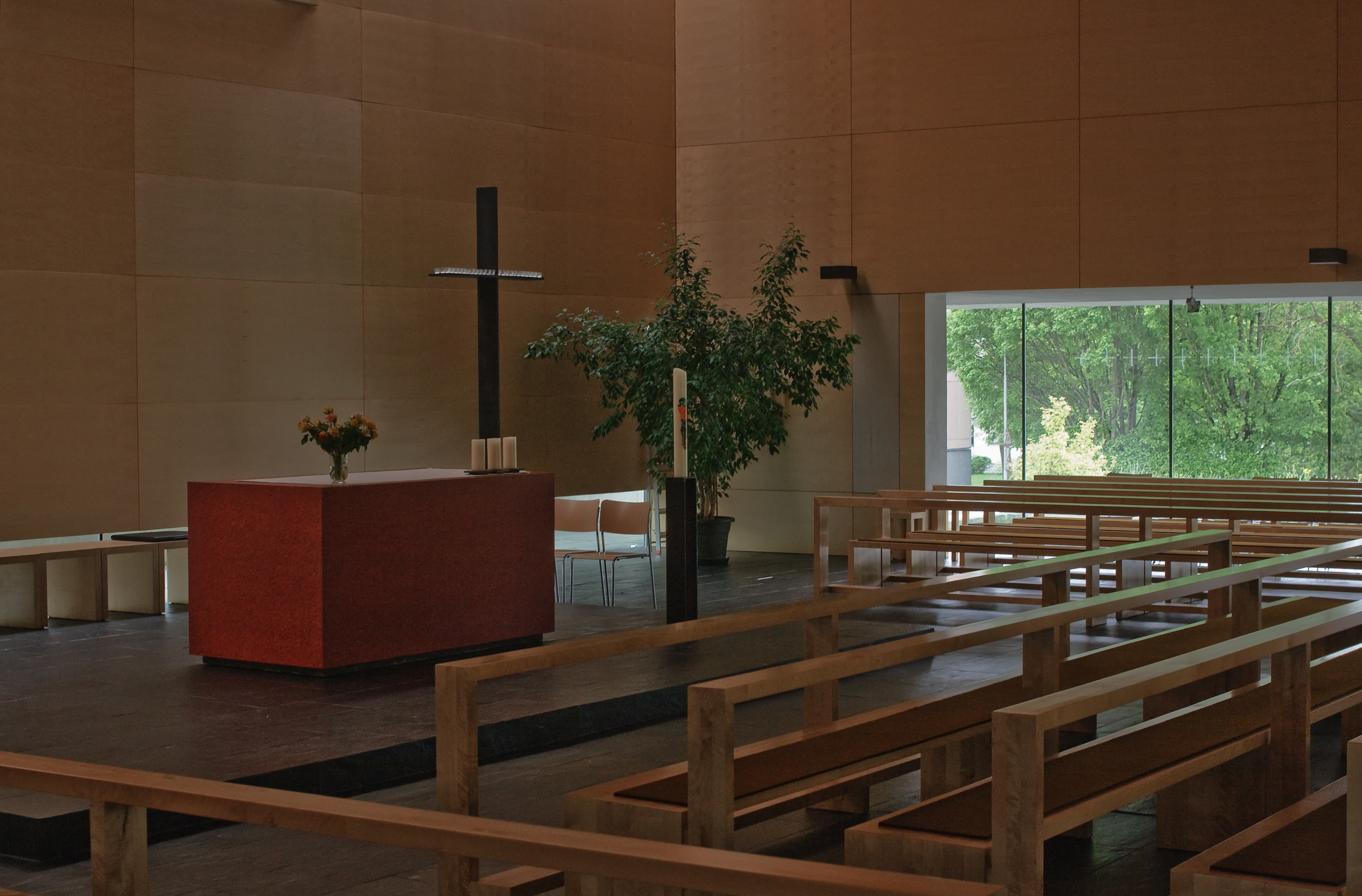 Die Pfarrkirche hl. Franz in Steyr-Resthof: Altarraum und Kirchenbänke